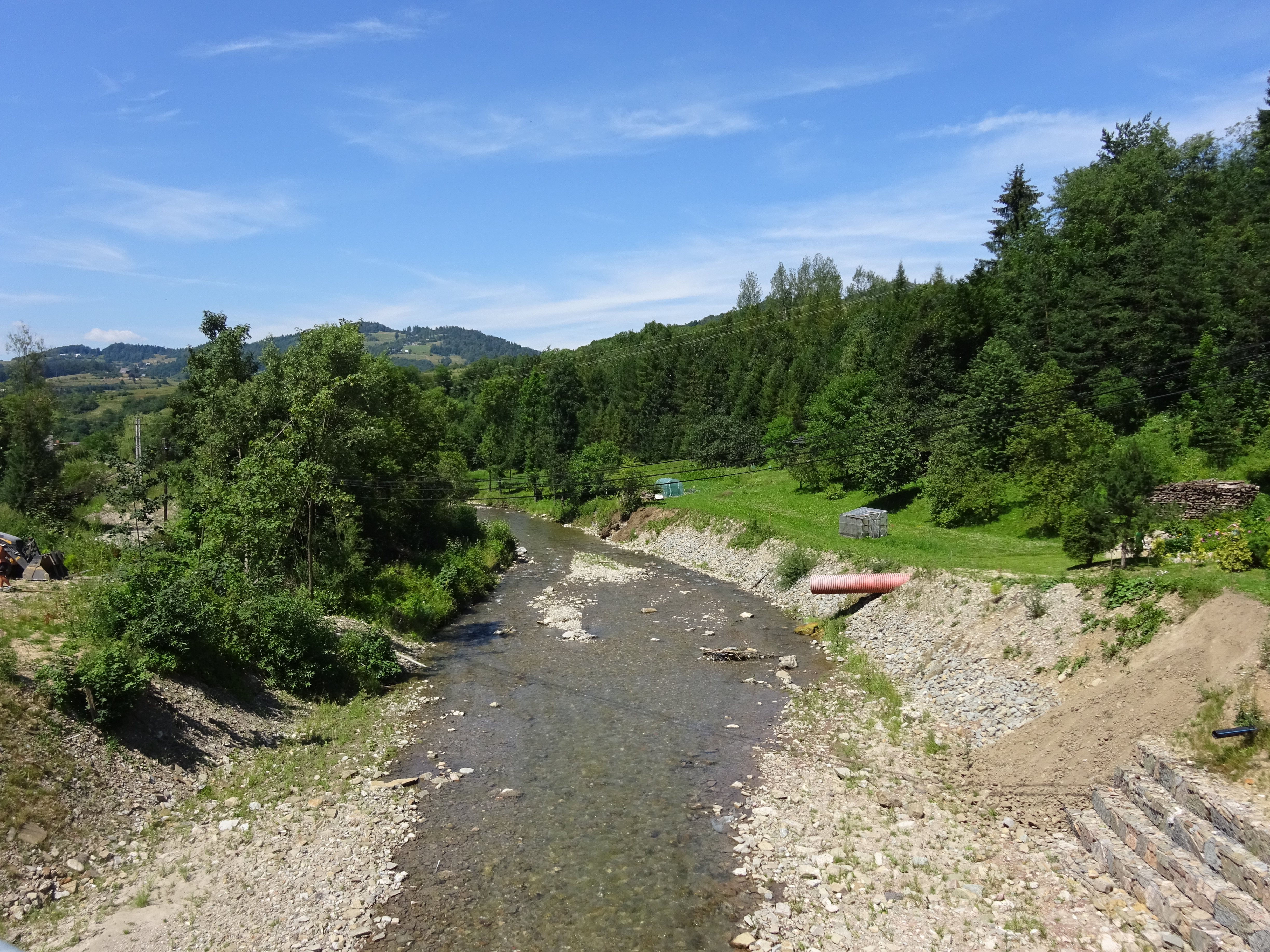 Grajcarek w Szlachtowej - widok w okolicach dolnej stacji kolejki w stronę zachodnią (ujścia).